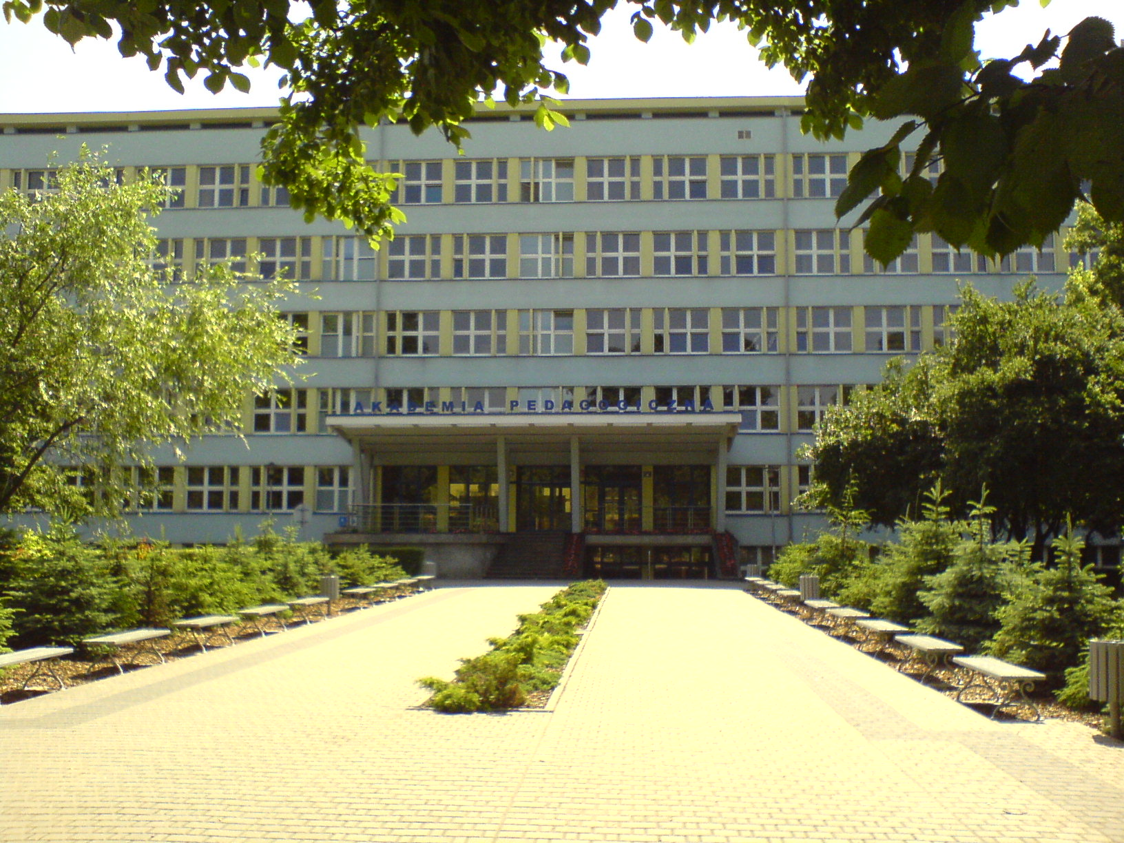 Front gmachu Uniwersytetu Pedagogicznego w Krakowie